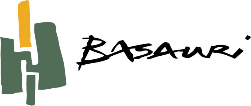 Logo in png format. →This file has been extracted from another file: Ayuntamiento de basauri.svg 300px